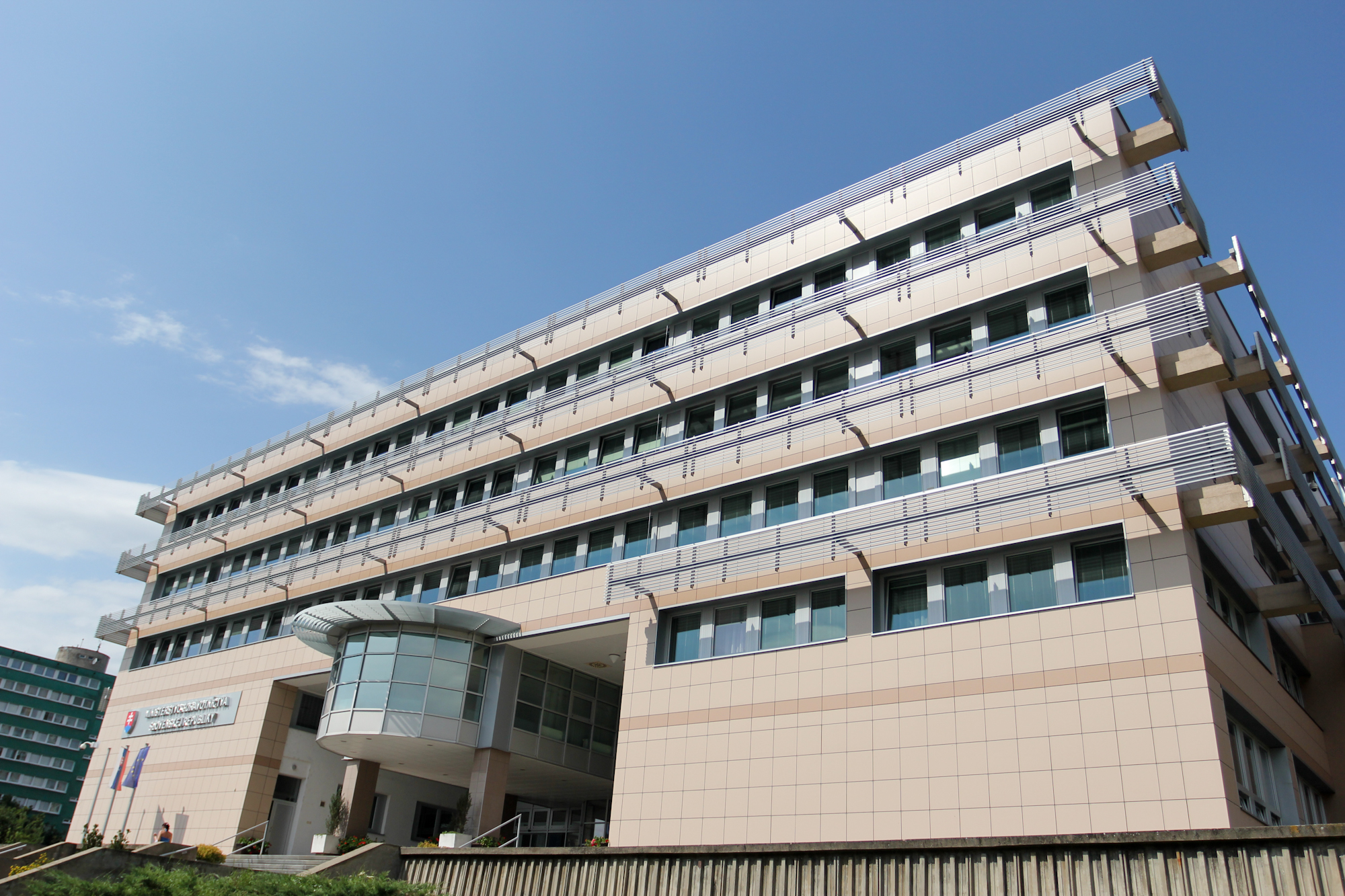 Budova ministerstva zdravotníctva Slovenskej republiky na ulici Limbová 2